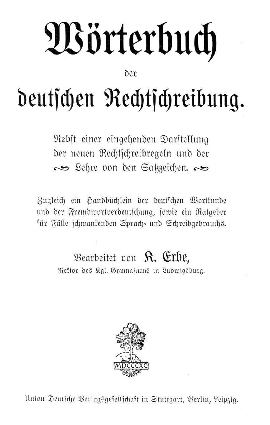 Titelseite von Karl Erbe: Wörterbuch der deutschen Rechtschreibung. Union Deutsche Verlagsgesellschaft, Stuttgart, Berlin, Leipzig 1902.